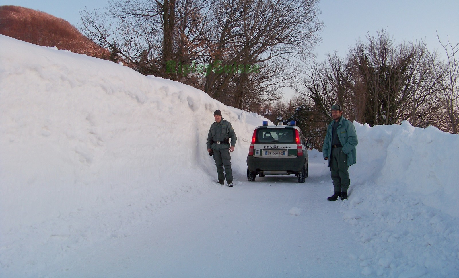 Polizia Provinciale di Bologna, Zona 4, insieme a Medelana, primo appennino bolognese, dopo il blizzard del 10-12 febbraio 2012, oltre 3 metri di neve in molti punti (record di oltre 4)